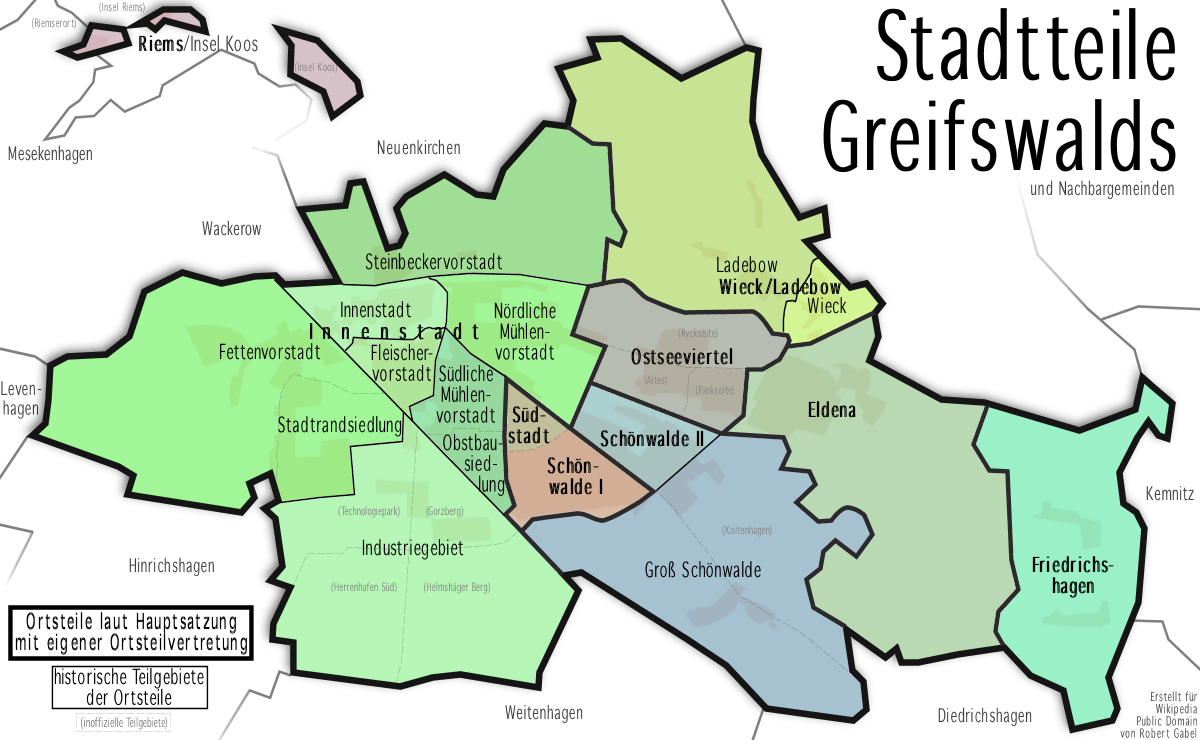 Stadtteile Greifswalds: dicke Linien und fette Schriftart markieren die kommunalrechtlichen Stadtteile (mit eigenen Ortsteilvertretungen), dünne Linien und normale Schriftart die einzelnen historischen Stadtteile